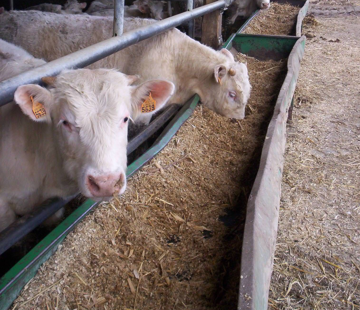 Broutards charolais devant une auge d'ensilage de maïs